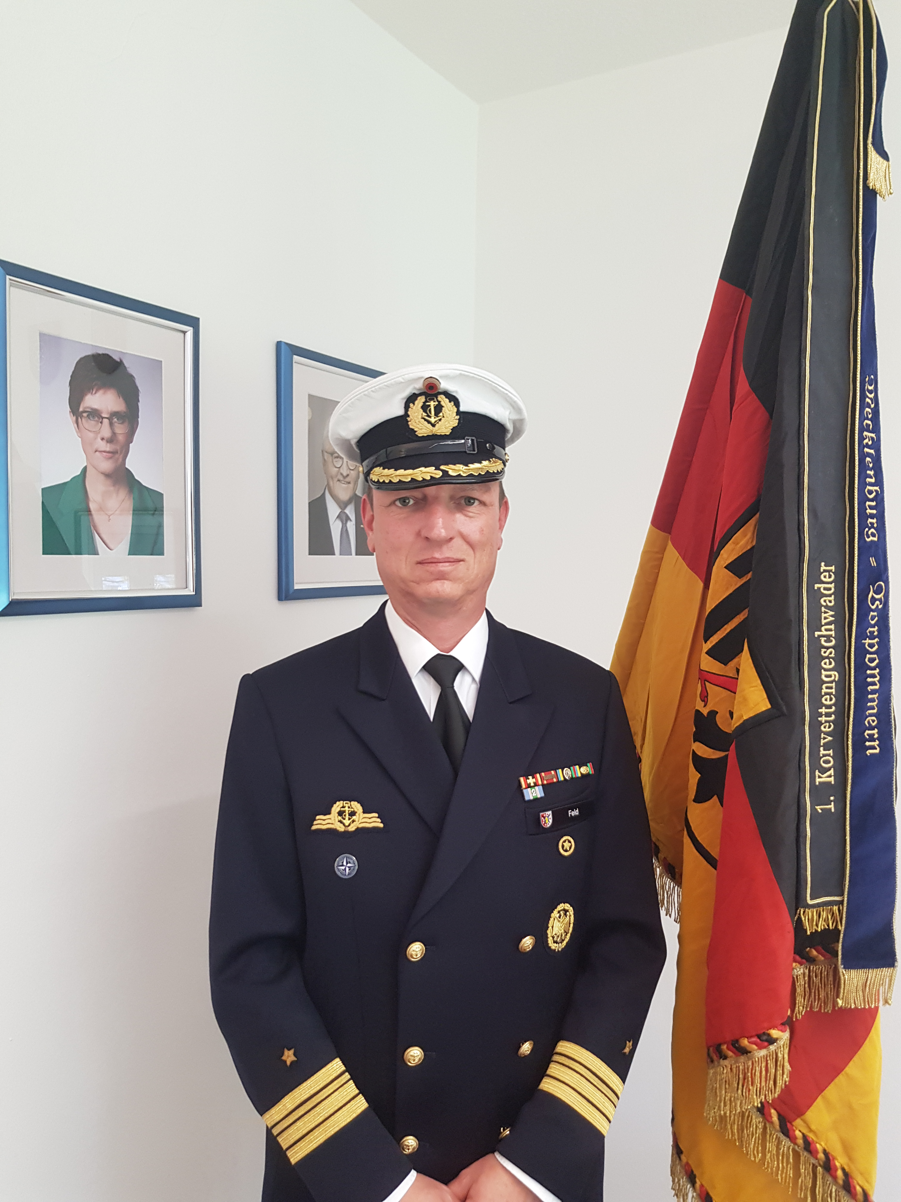 Derzeitiger Kommandeur 1. Korvettengeschwader